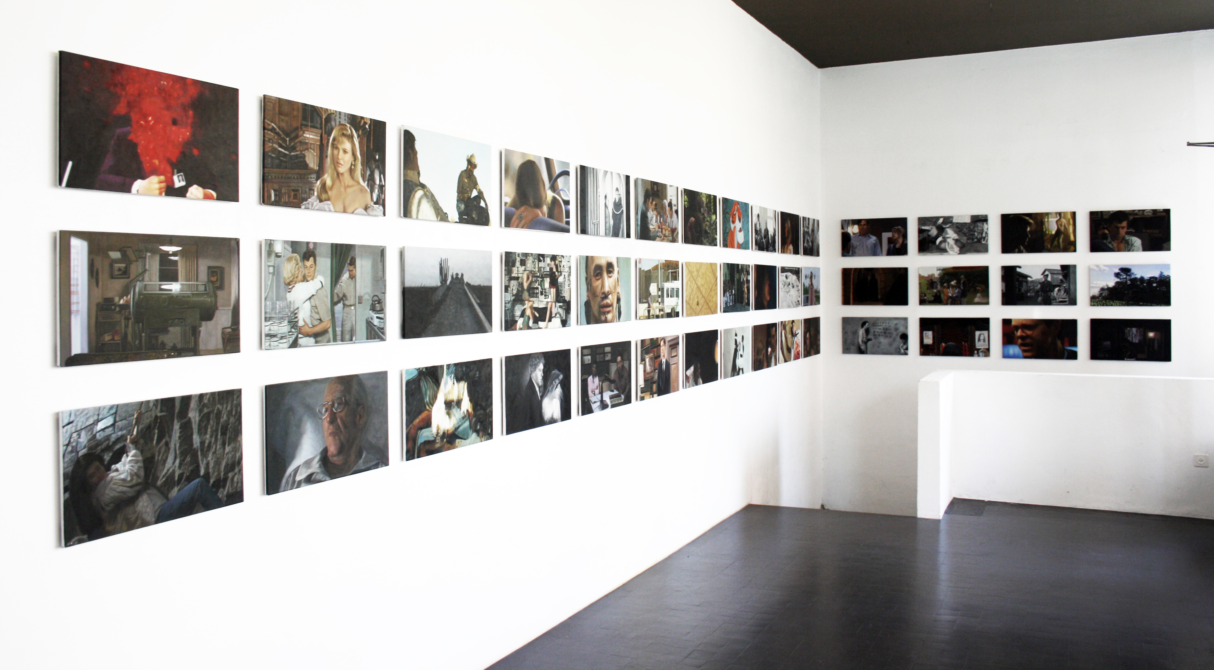 Jan-Hendrik Pelz, Ausstellungsansicht "Favorites", 56. Internationales Filmfestival Locarno, 2014